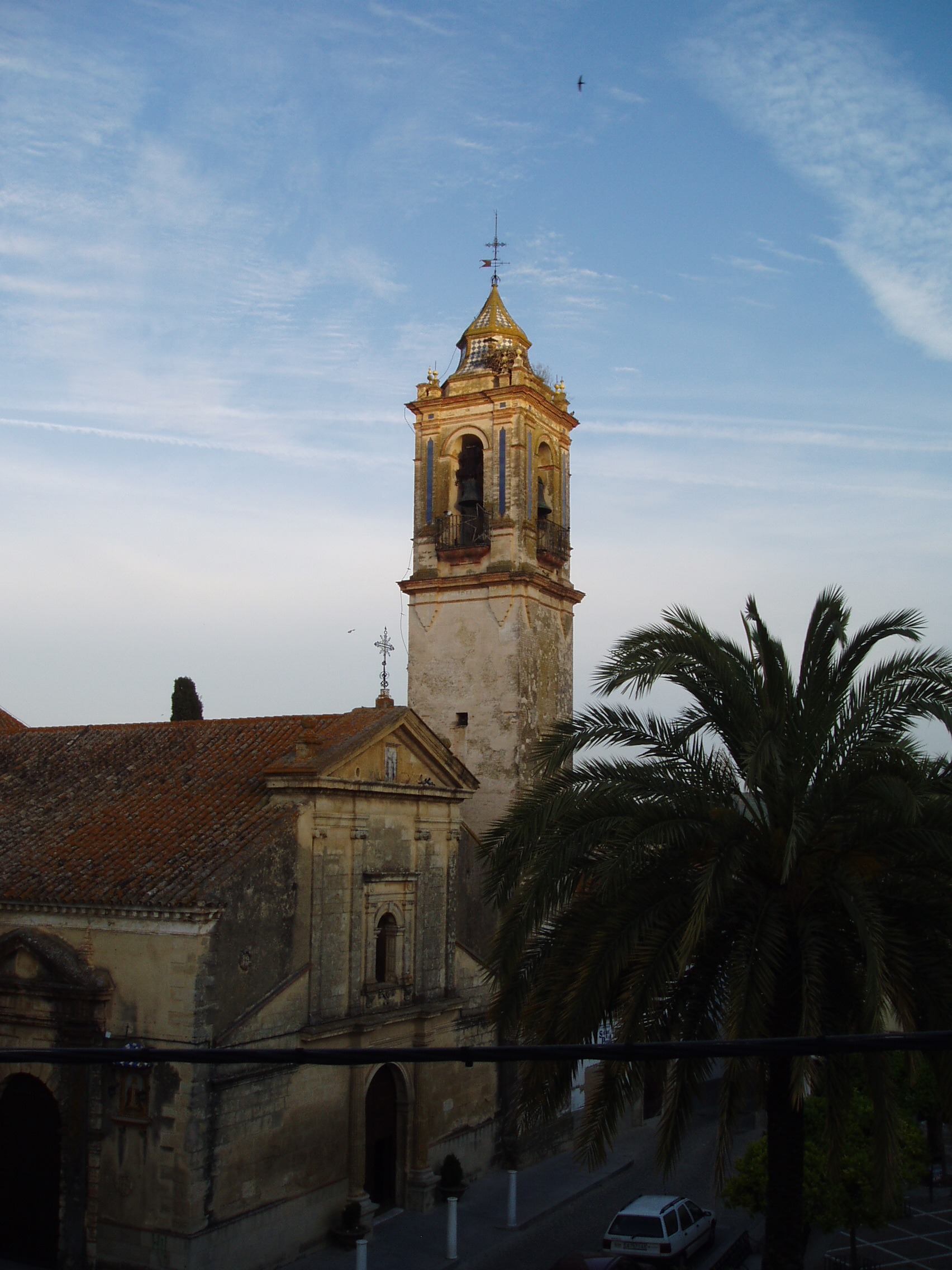 Iglesia de Sto. Domingo en Bornos, provincia de Cádiz.